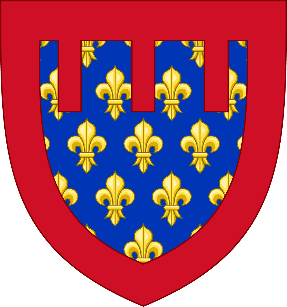 Blason de Charles de Valois avant 1297.